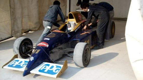 Prototipo 2010 de F-1 Mecánica argentina